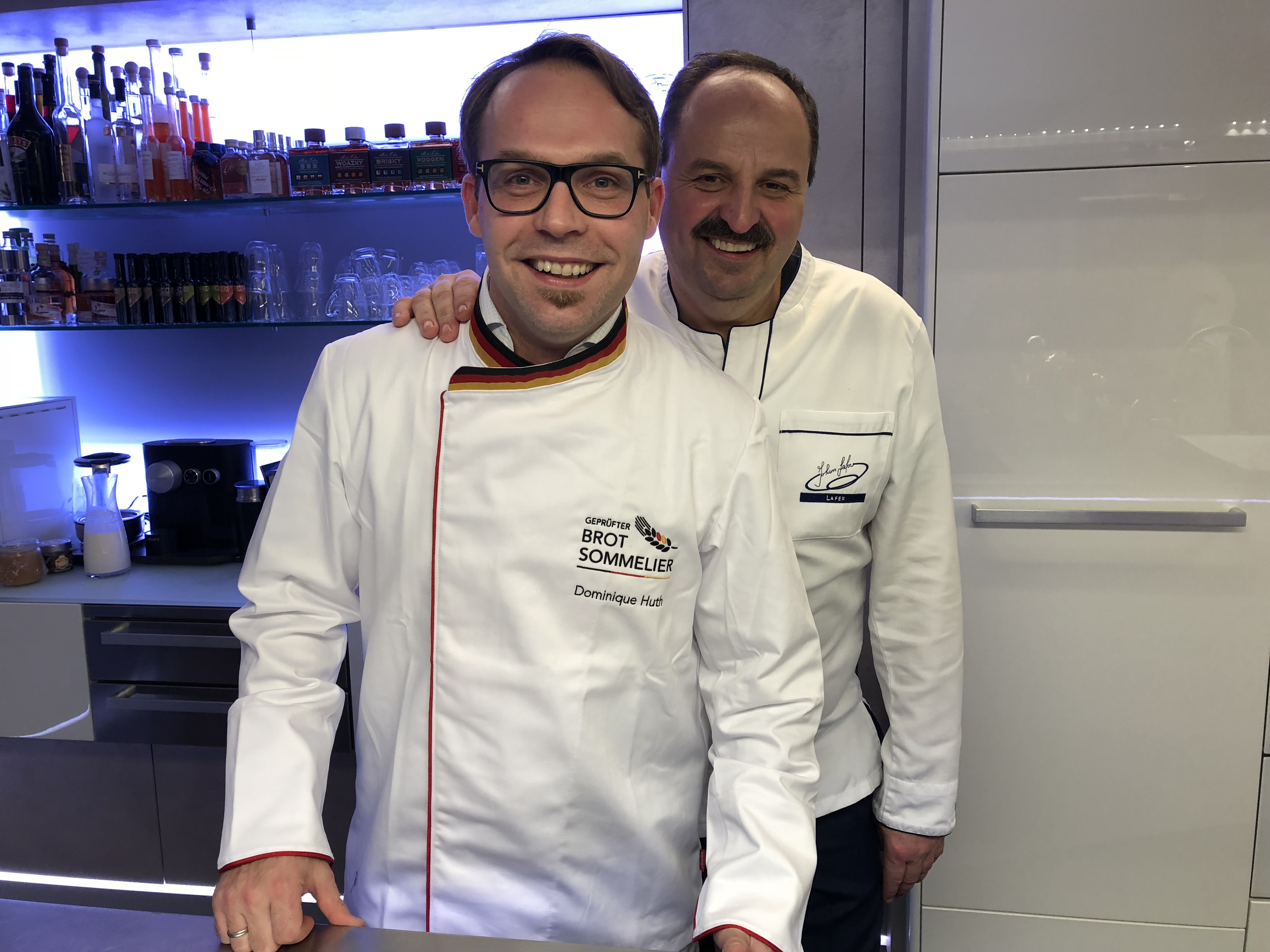 Brotsommelier Dominique Huth mit Starkoch Johan Lafer